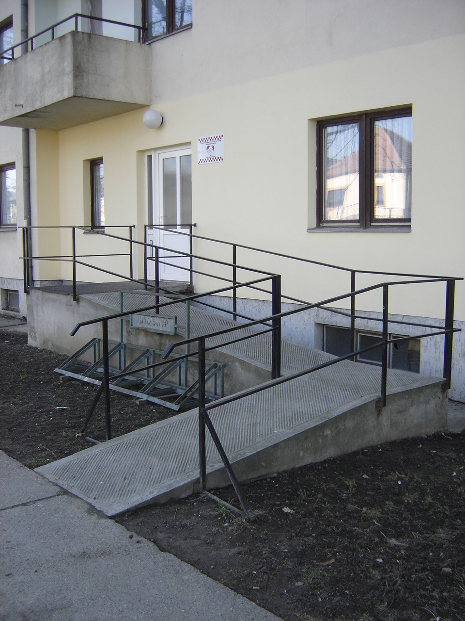 Baranjsko srce, Beli Manastir